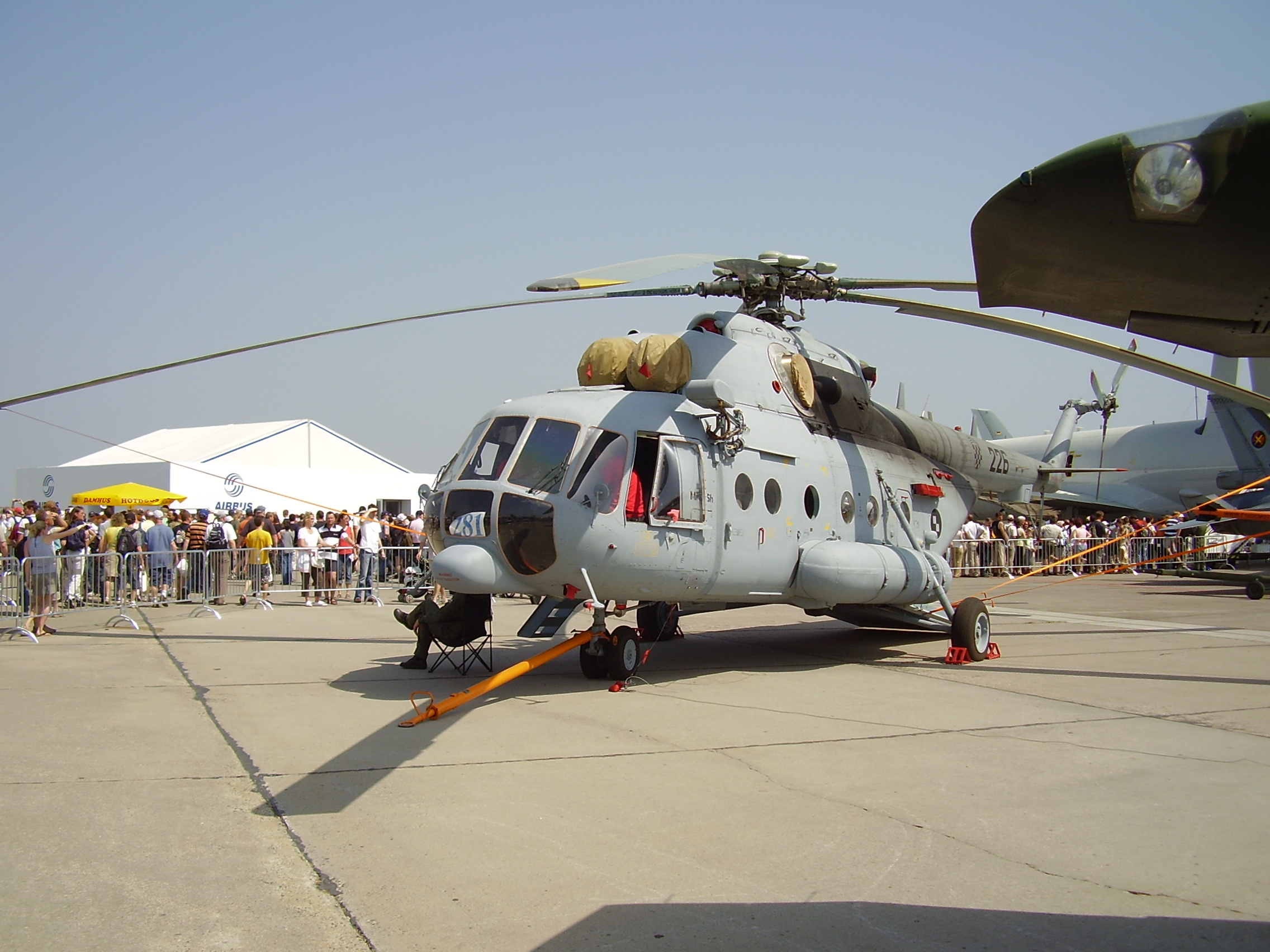 ILA 2008 Mil Mi-171 Sh (H-226)